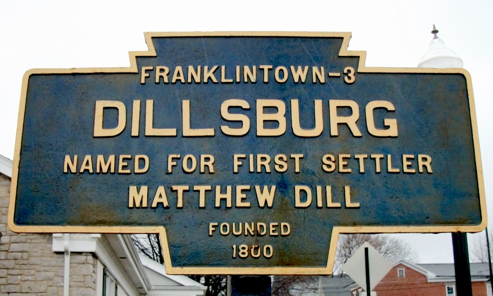 Keystone Marker for Dillsburg, Pennsylvania